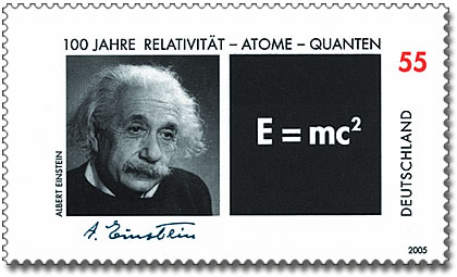 100 Jahre Relativität - Atome - Quanten - Albert Einstein, Porträt Albert Einsteins mit der Formel E = mc²; Foto: © Fred Stein Archiv, Wilton (USA)